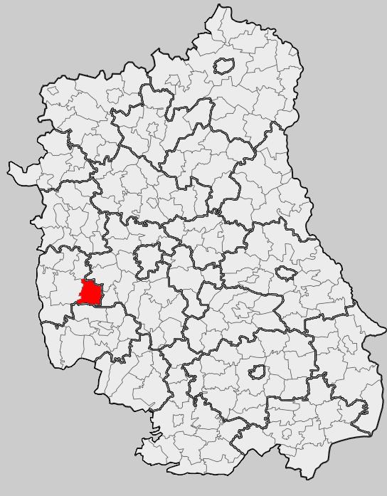 Map of gmina Chodel, Opole Lubelskie county, Lublin voivodship Mapa gminy Chodel, powiat opolski, województwo lubelskie